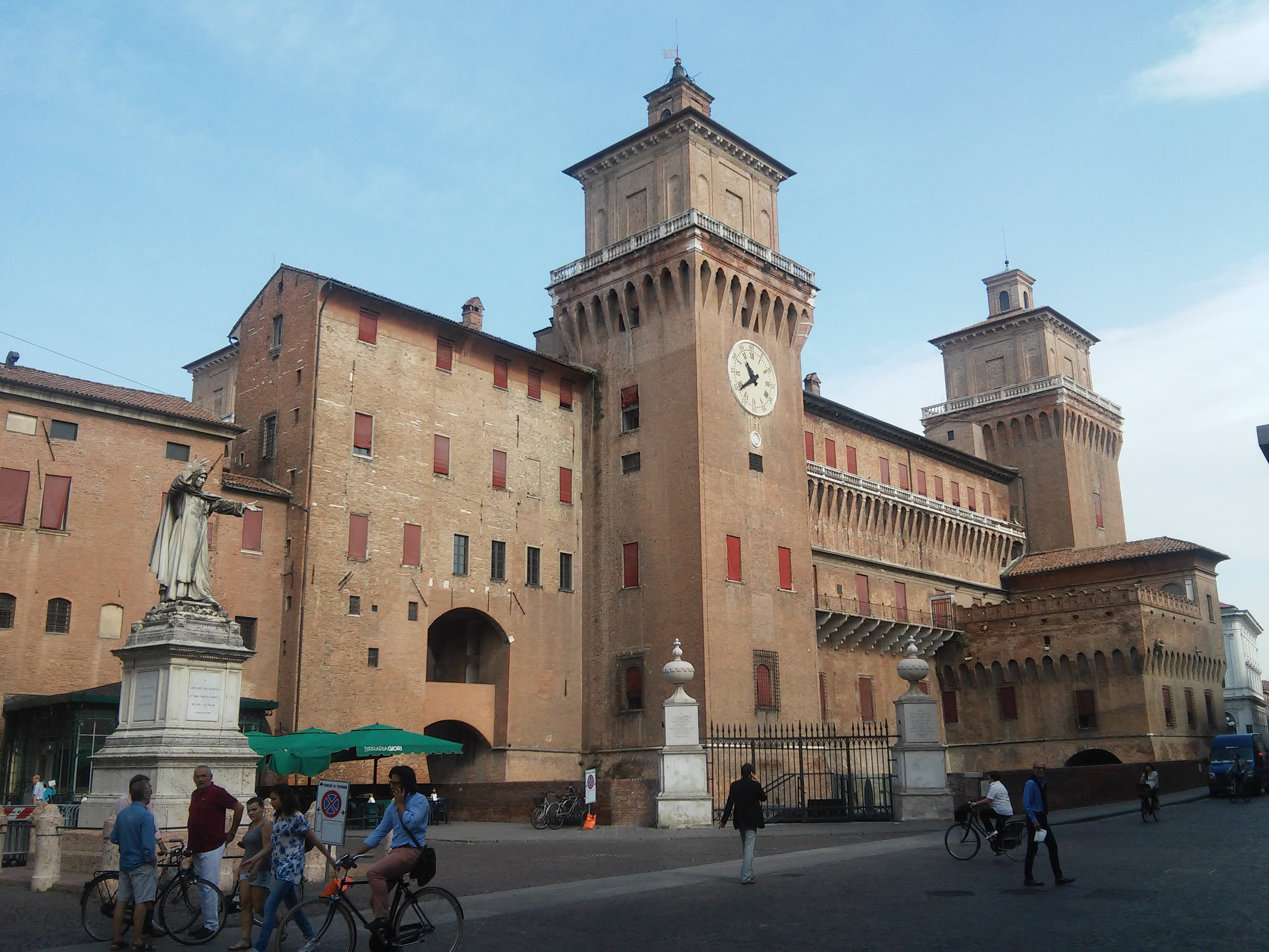 Castello Estense This is a photo of a monument which is part of cultural heritage of Italy.